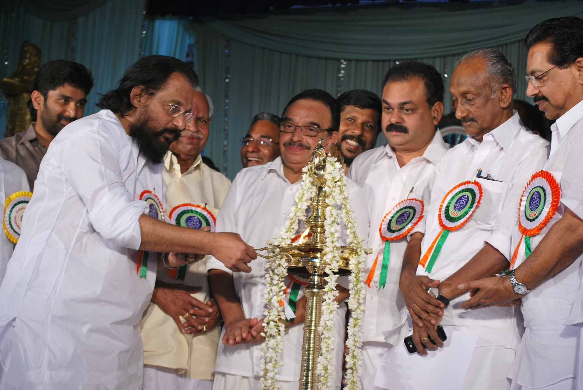 52‌ാമത് കേരള സ്കൂള്‍ കലോത്സവം 16.1.2012-നു തൃശ്ശൂരില്‍ ഡോ.കെ.ജെ.യേശുദാസ് ഭദ്രദീപം കൊളുത്തി ഉദ്ഘാടനം ചെയ്യുന്നു.